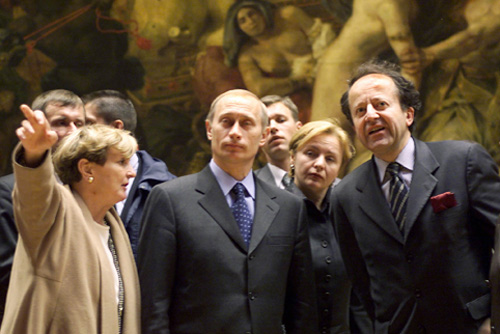 ПАРИЖ. Владимир Путин и Людмила Путина во время осмотра экспозиции Лувра.